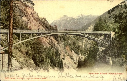 Brücke über das Versamertobel (Kanton Graubünden) auf Postkarte von 1901